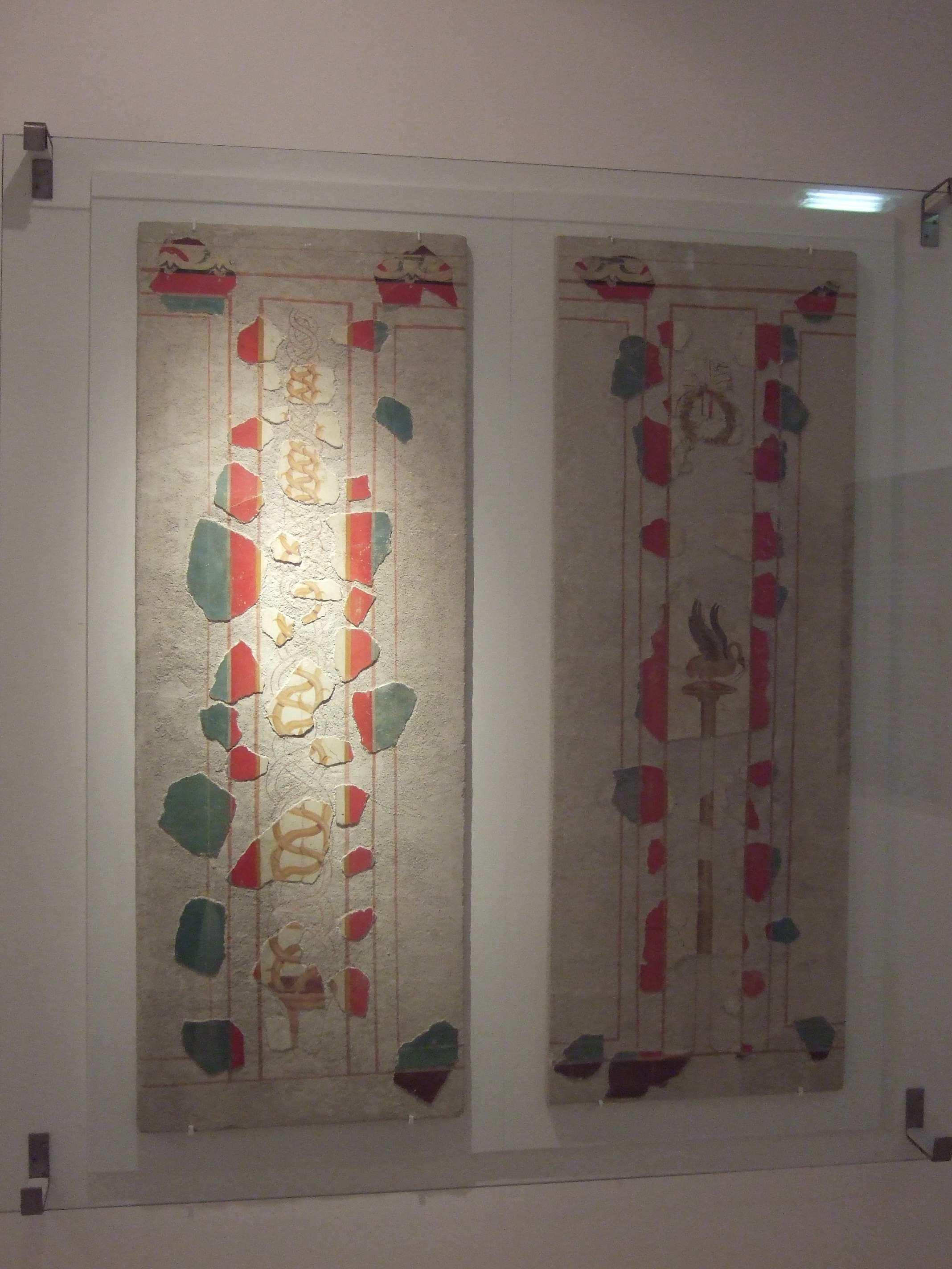 Museo de Calatayud - Bilbilis - Decoración de las termas s. II - IV estilo pompeyano